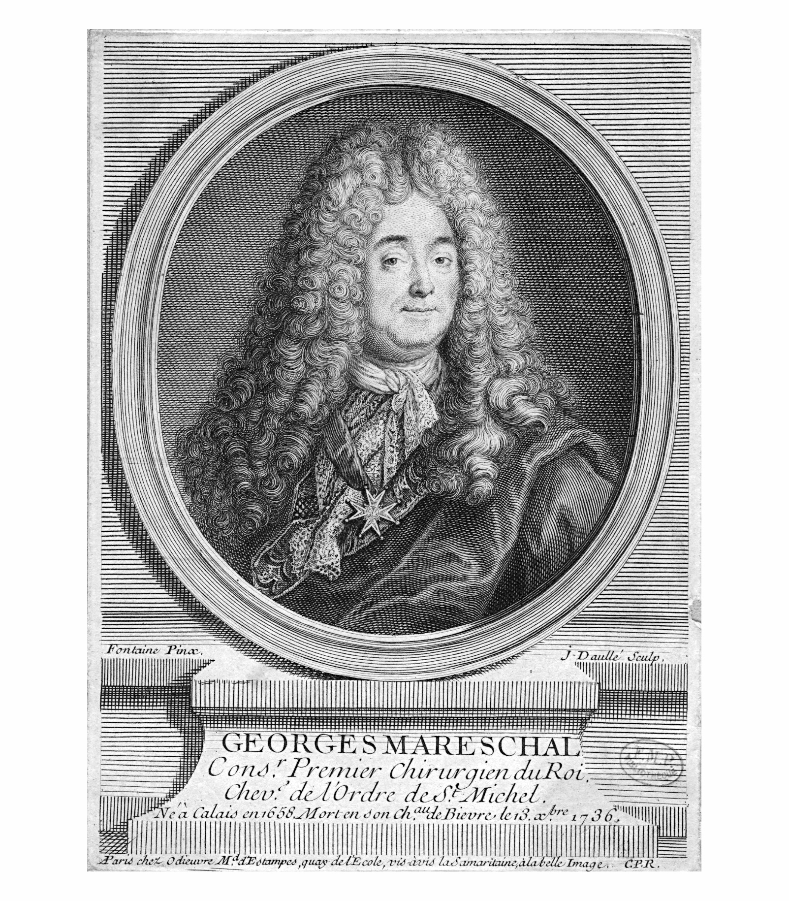 Portrait George Mareschal